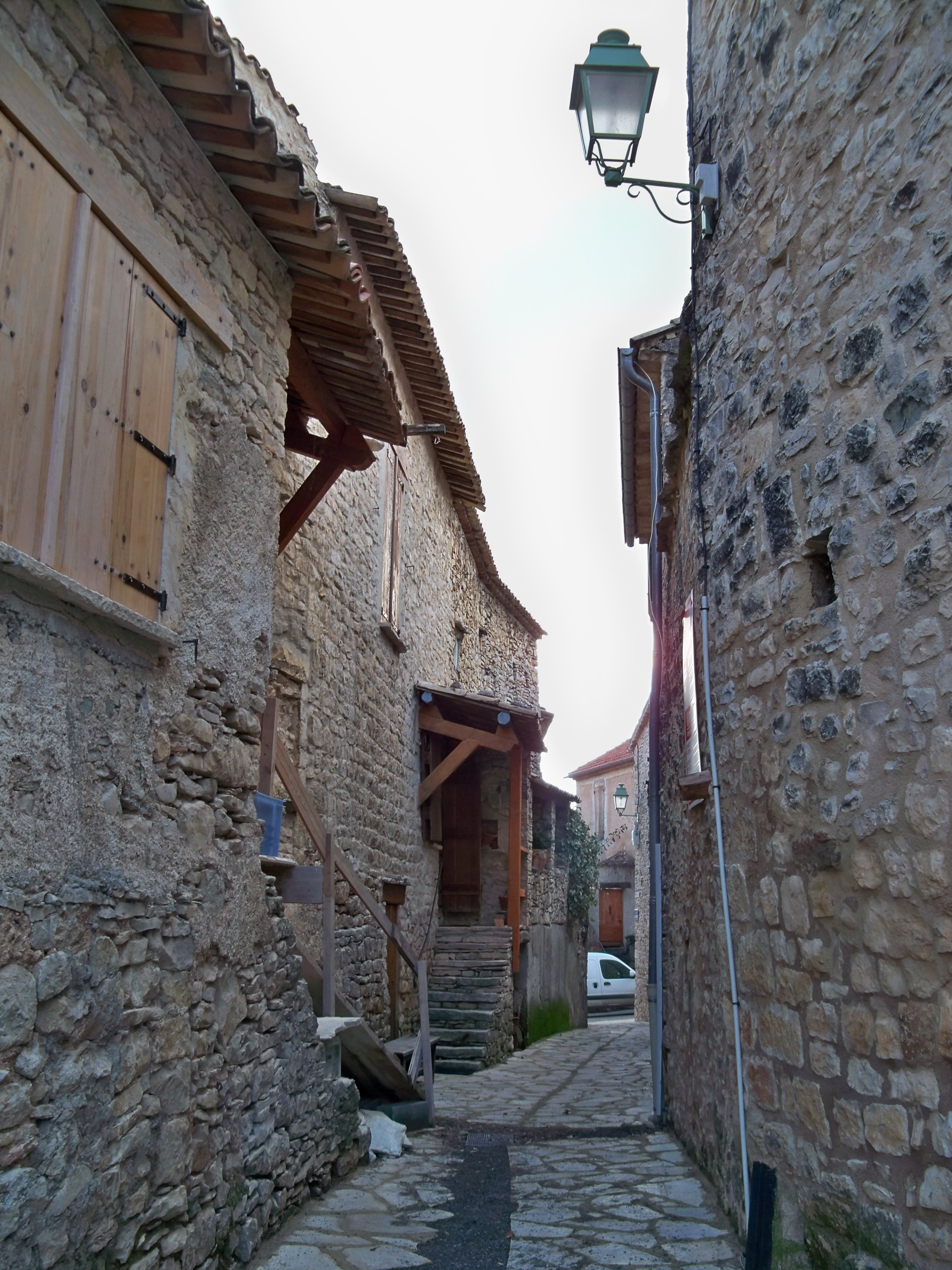 Rue à l'Hospitalet (04), France